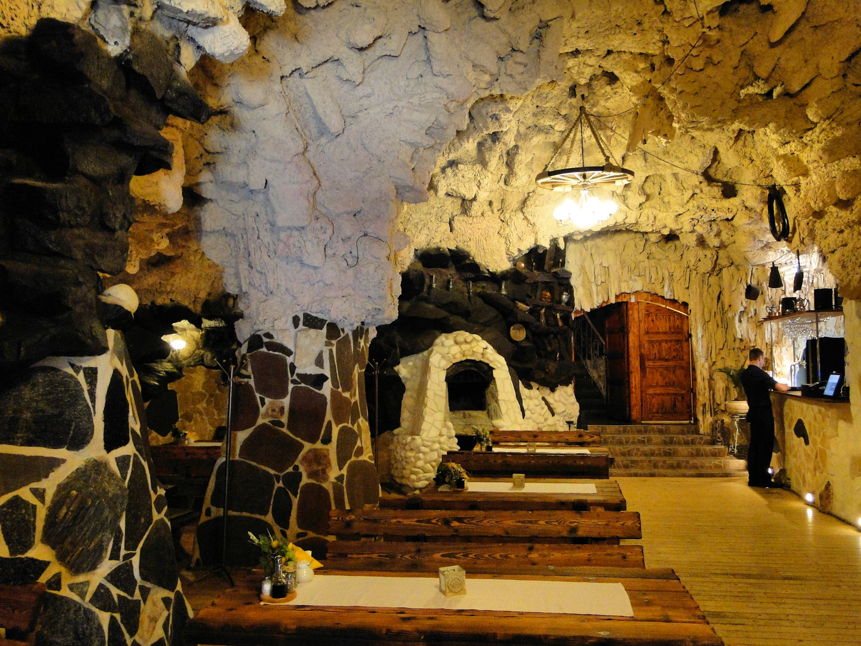 Wnętrze Groty "Za Łukami" w Szczecinie Zdrojach